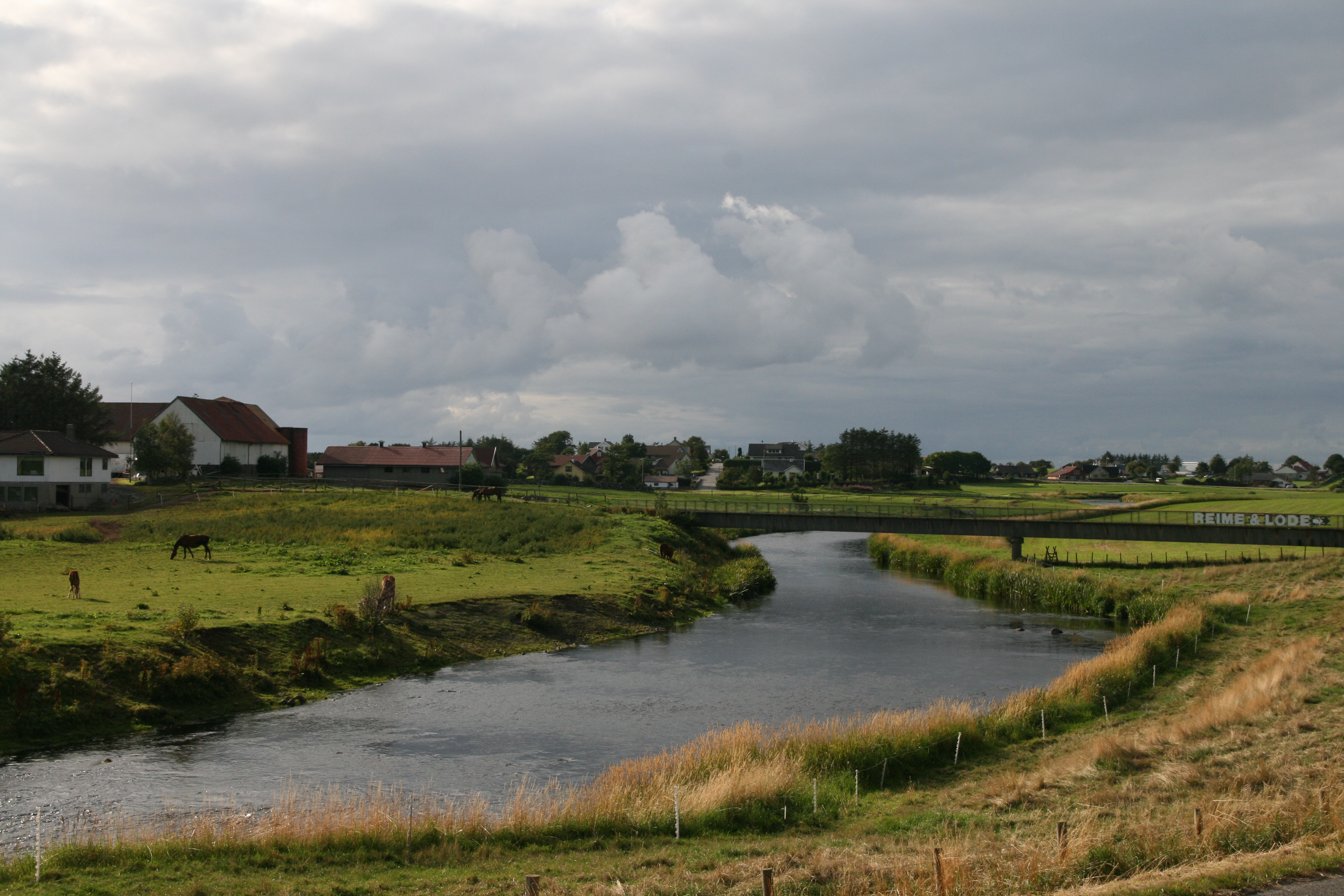 Håelva